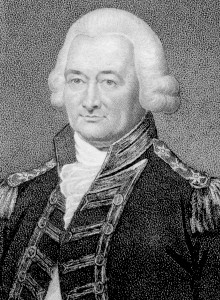 Admiral Sir Peter Parker